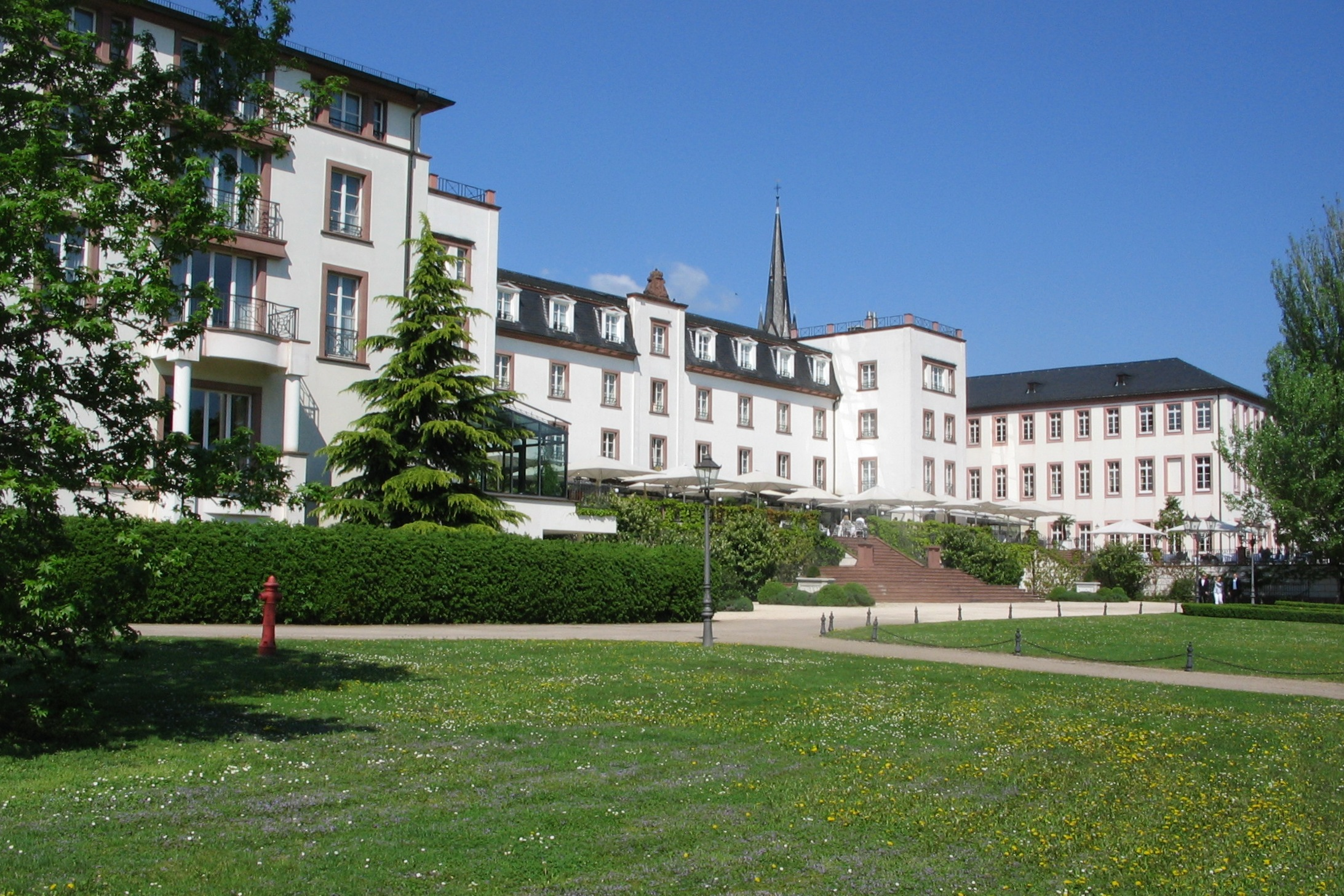 Blick aus Südwesten auf die Parkseite von Schloss Reinhartshausen